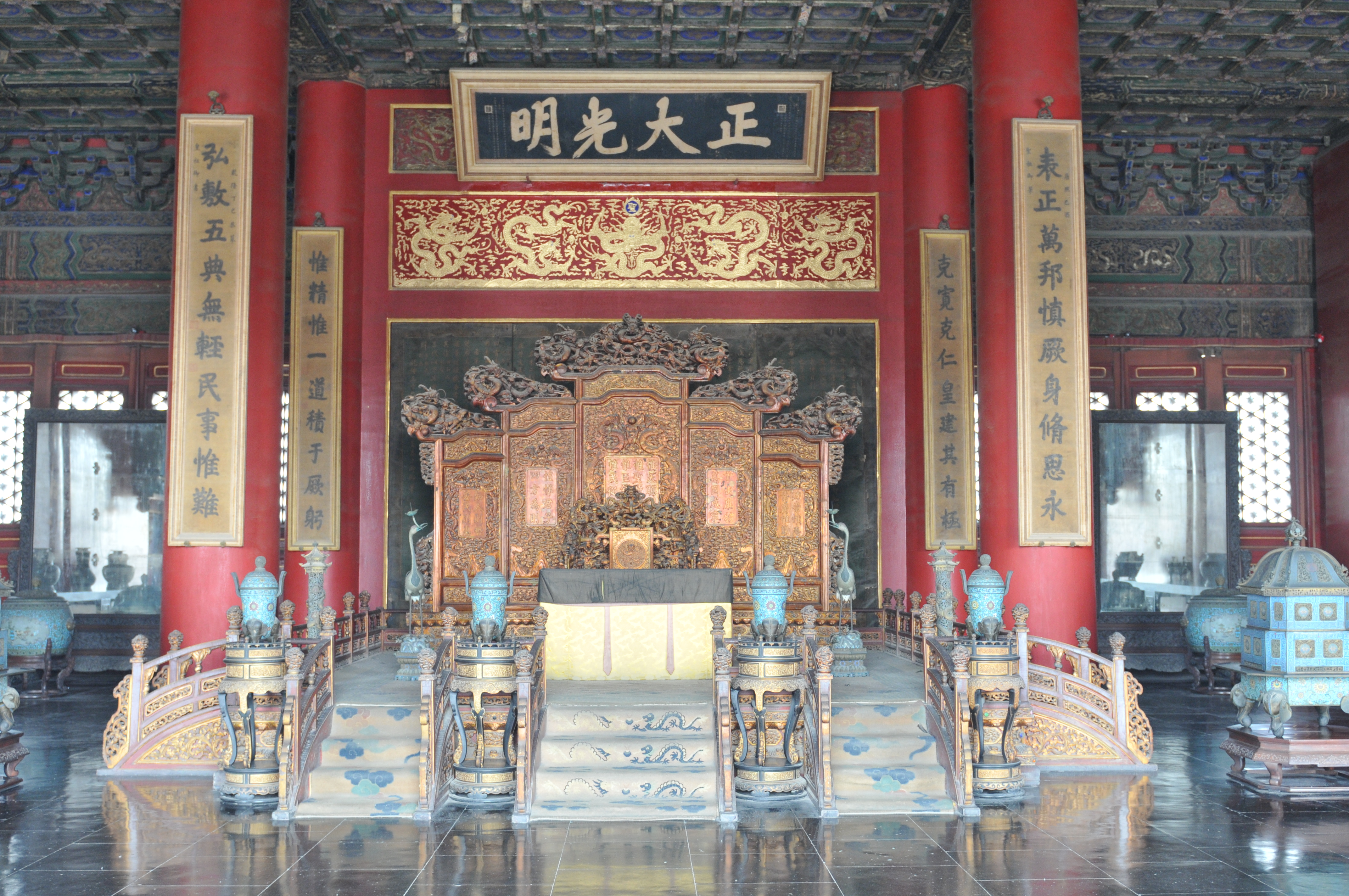 中国北京市西城区China Beijing, Xicheng District, China Xinjiang Urumqi Welcome you to tour the, Китай Синьцзяна Урумчи приветствовать Вас на экскурсию, الصين ترحب زيارتك لاورومتشى فى شينجيانغ, 中国新疆のウルムチへの訪問を歓迎する, 中国新疆乌鲁木齐欢迎您来观光旅游